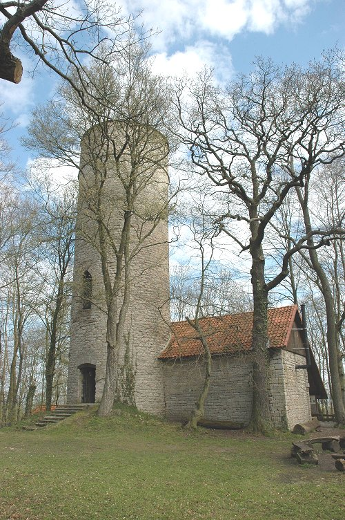 Burg Grubenhagen bei Einbeck (Deutschland), Bergfried und ehemaliger Pferdestall